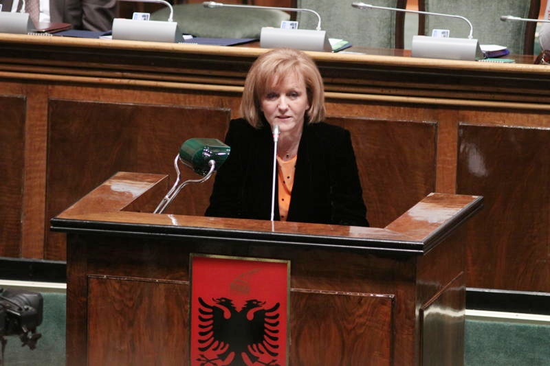 Pernaska ne Kuvendin e Shqiperise per te drejtat e grave dhe rolin e tyre ne vendimarrje.